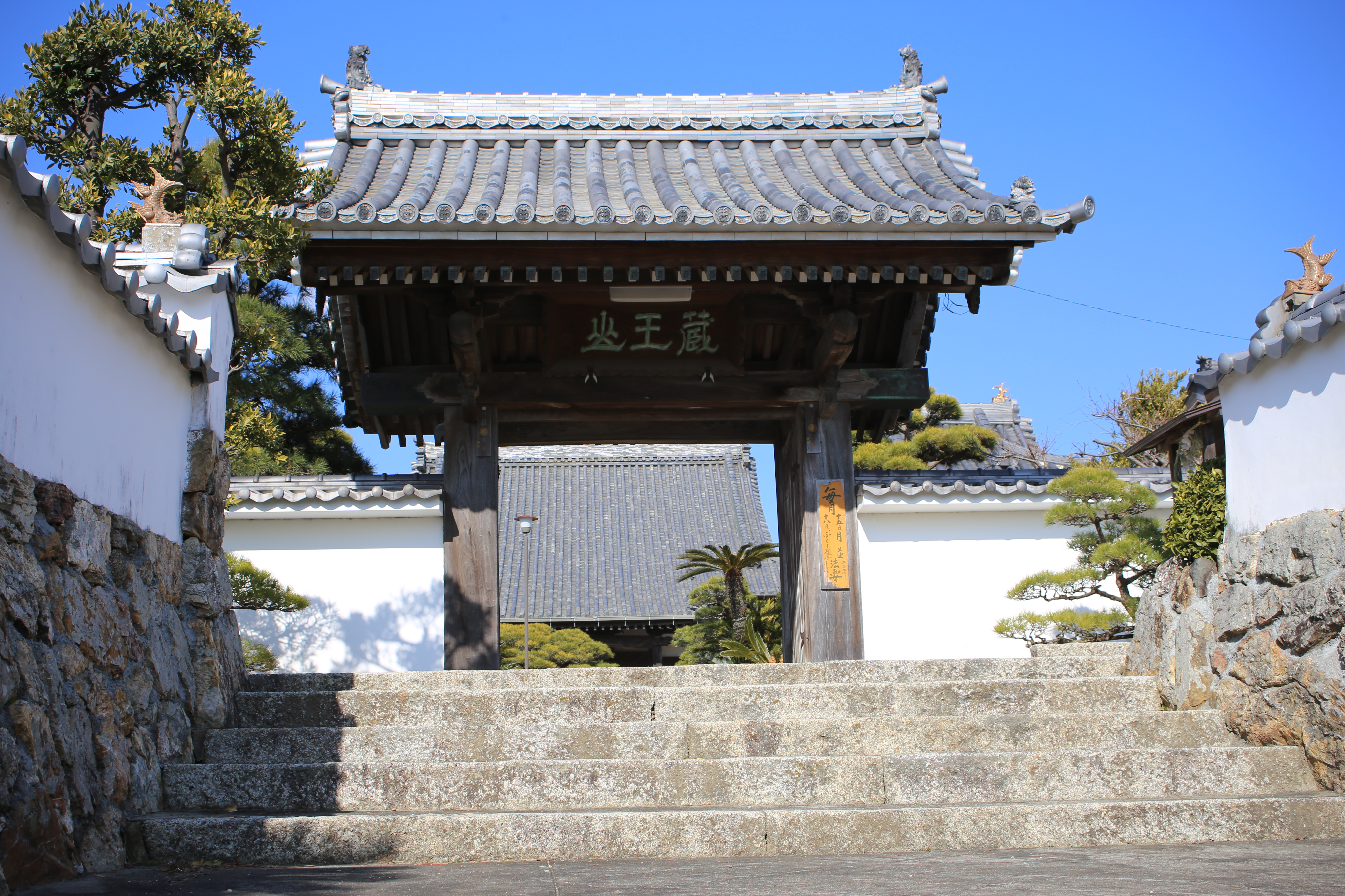 愛知県田原市田原町の竜門寺